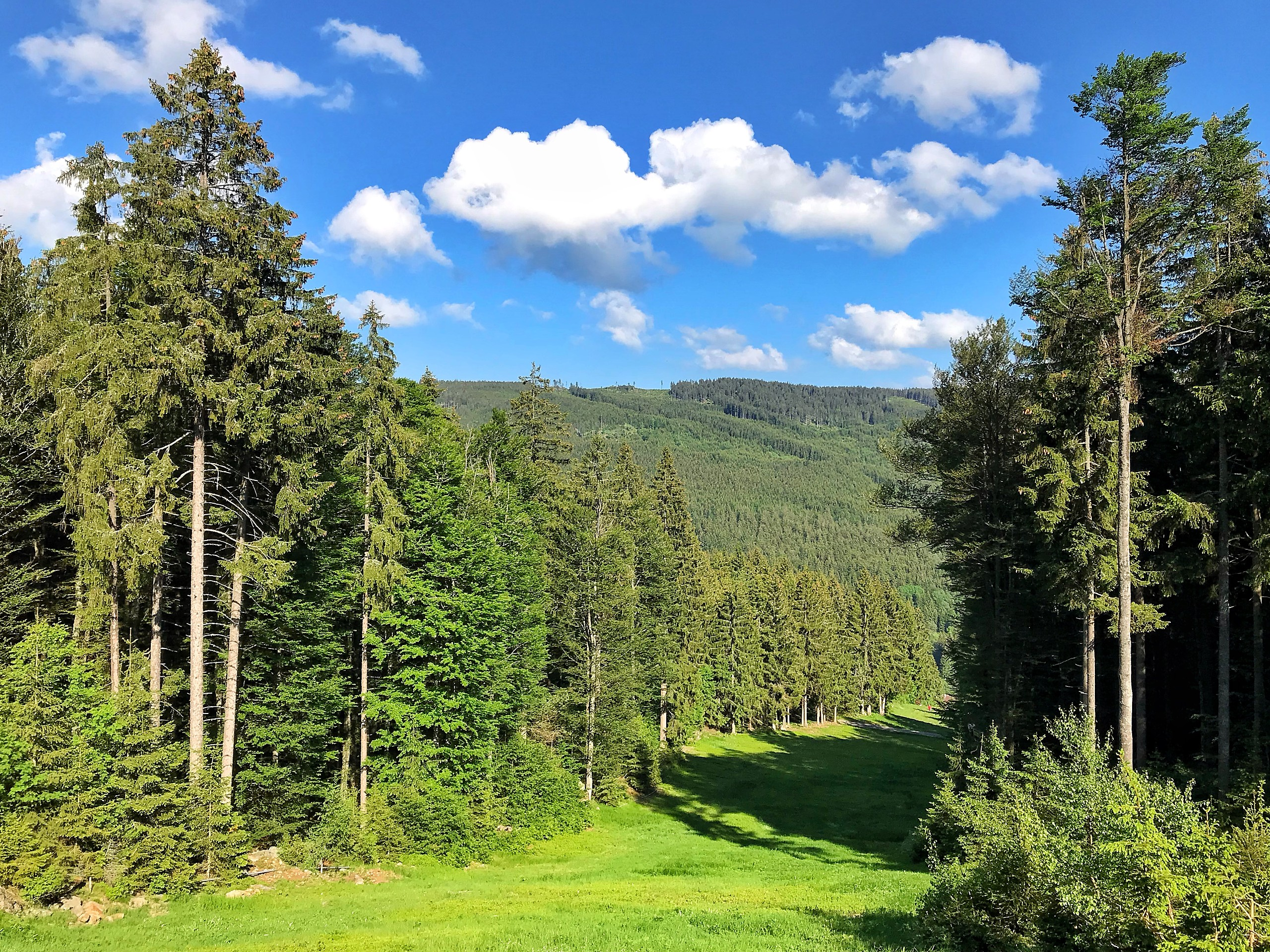 Sjezdovka na jihovýchodním svahu Obrovce ve skiareálu Kubova Huť